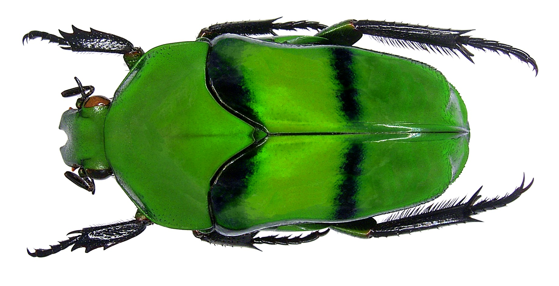 Familie: Scarabaeidae Grösse: 25,8-33,7 mm Verbreitung: Indonesien, Irian Jaya Fundort: Indonesien, Iria Jaya, Manokwari, Mt.Arfak, 2007 det. A.Skale, 2007 Foto: U.Schmidt, 2007